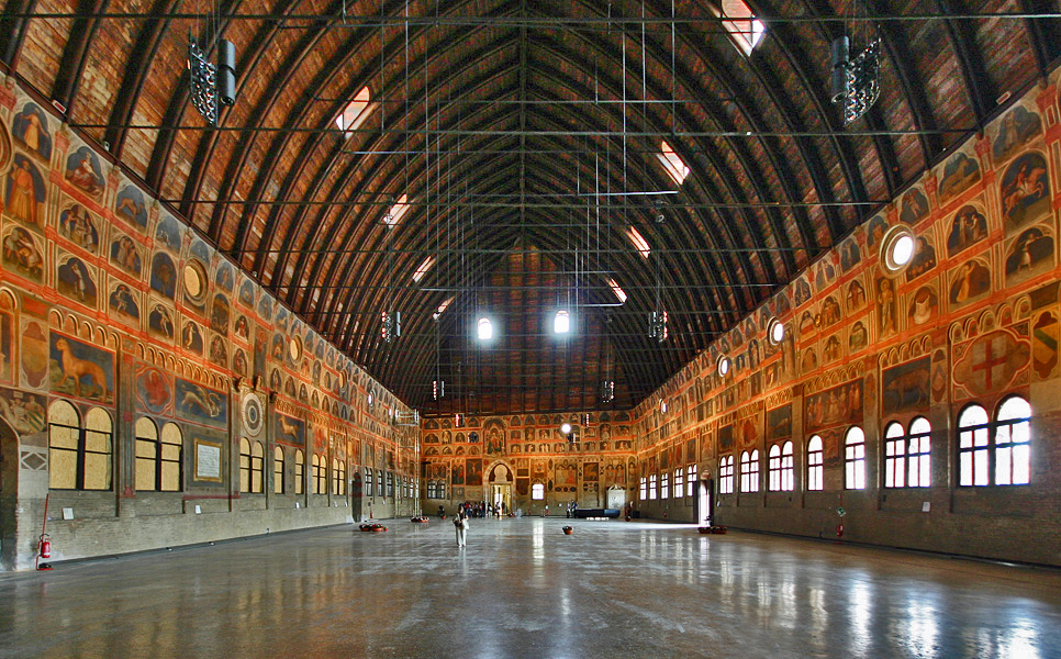 Palazzo della Ragione, Padua, Veneto, Italien: Saal